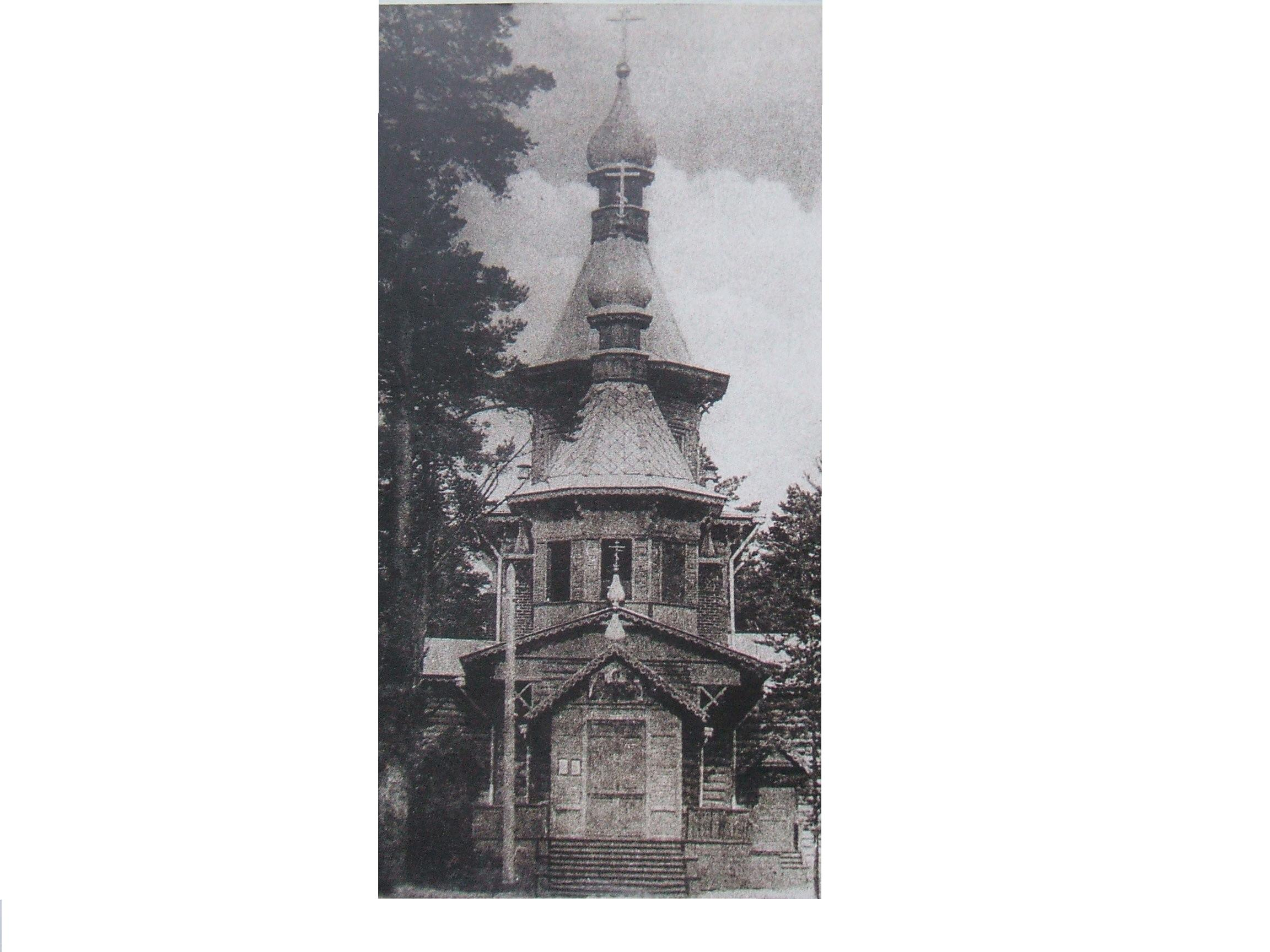 фотография Тарховской церкви до 1917 года